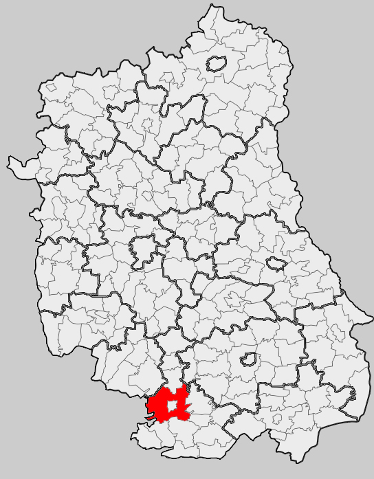 Map of gmina Biłgoraj (rural), Biłgoraj county, Lublin voivodship Mapa gminy Biłgoraj(wiejska), powiat biłgorajski, województwo lubelskie